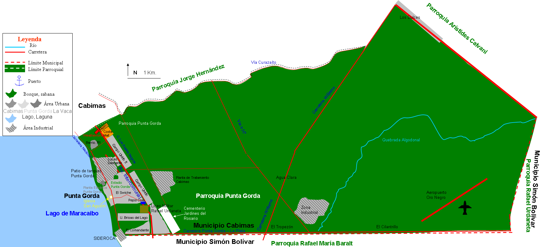 Parroquia Punta Gorda Municipio Cabimas, Zulia, Venezuela